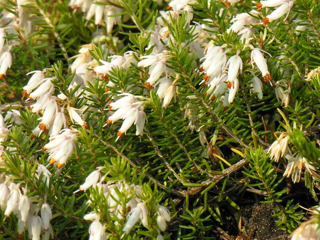 Erika (Erica?) (Comment: This is not Erica lusitanica) Šeima. Erikiniai (Ericaceae) Fotografavo: Algirdas, 2006 m. balandžio 26 d., kapinėse.